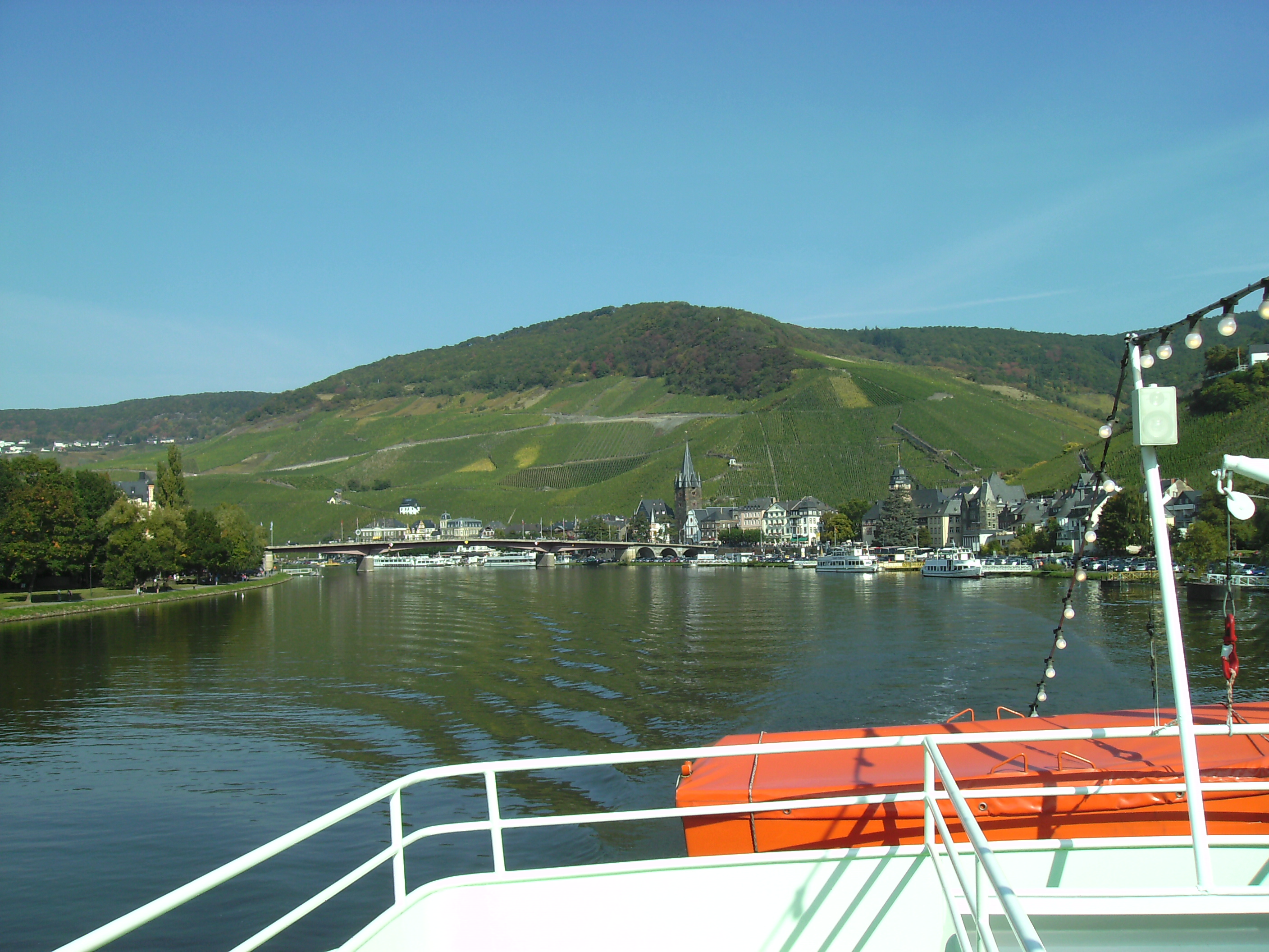 Bernkastel-Kues: Gesamtansicht mit Weinlage "Doctor" im Hintergrund